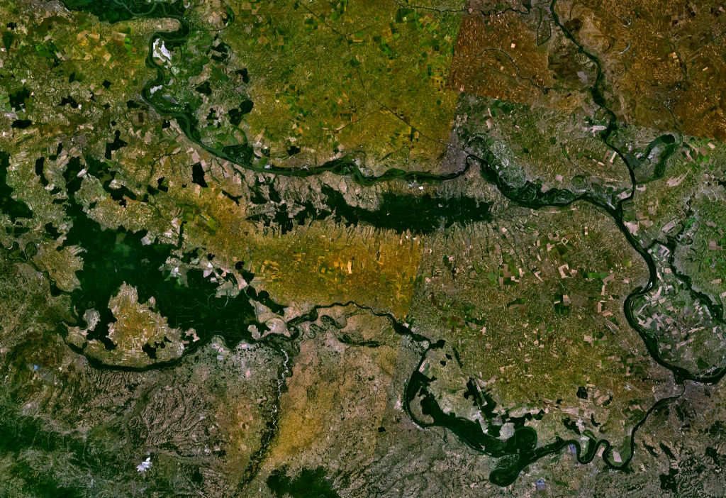 Снимак Срема у симулираним бојама, из НАСА-иног сателита Ландсат 7. Слика направљена помоћу програма NASA World Wind.